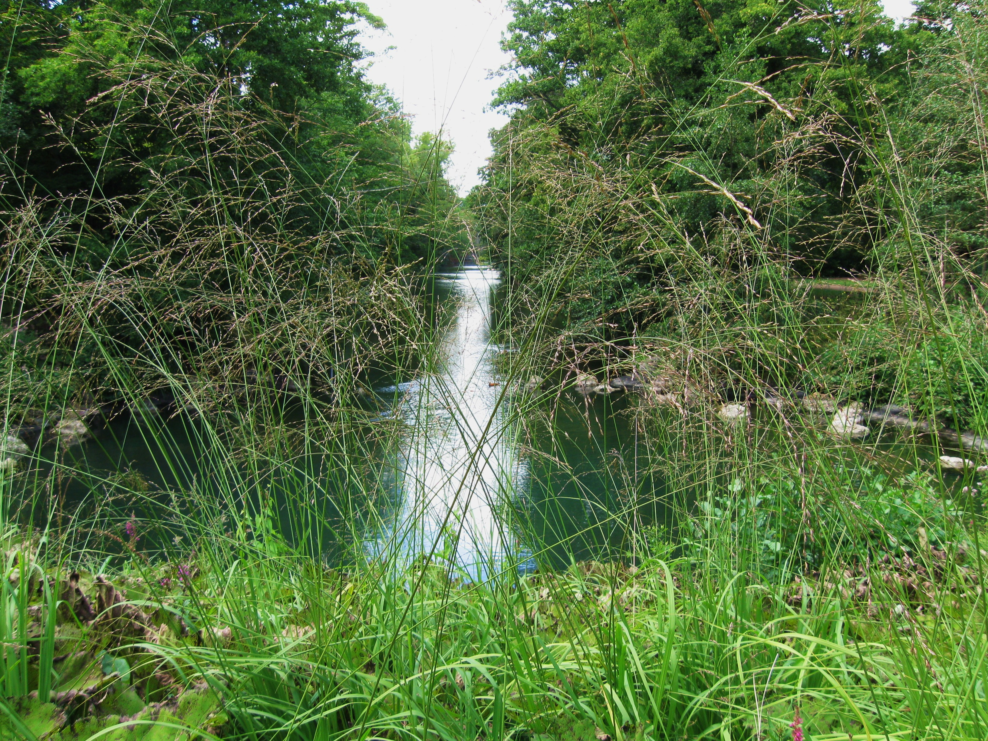 Source du Loiret, Parc Floral de la Source, Orléans, Loiret, France